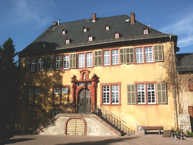 Prälaturgebäude, das jetzige Pfarrhaus, Kloster Schönau im Taunus